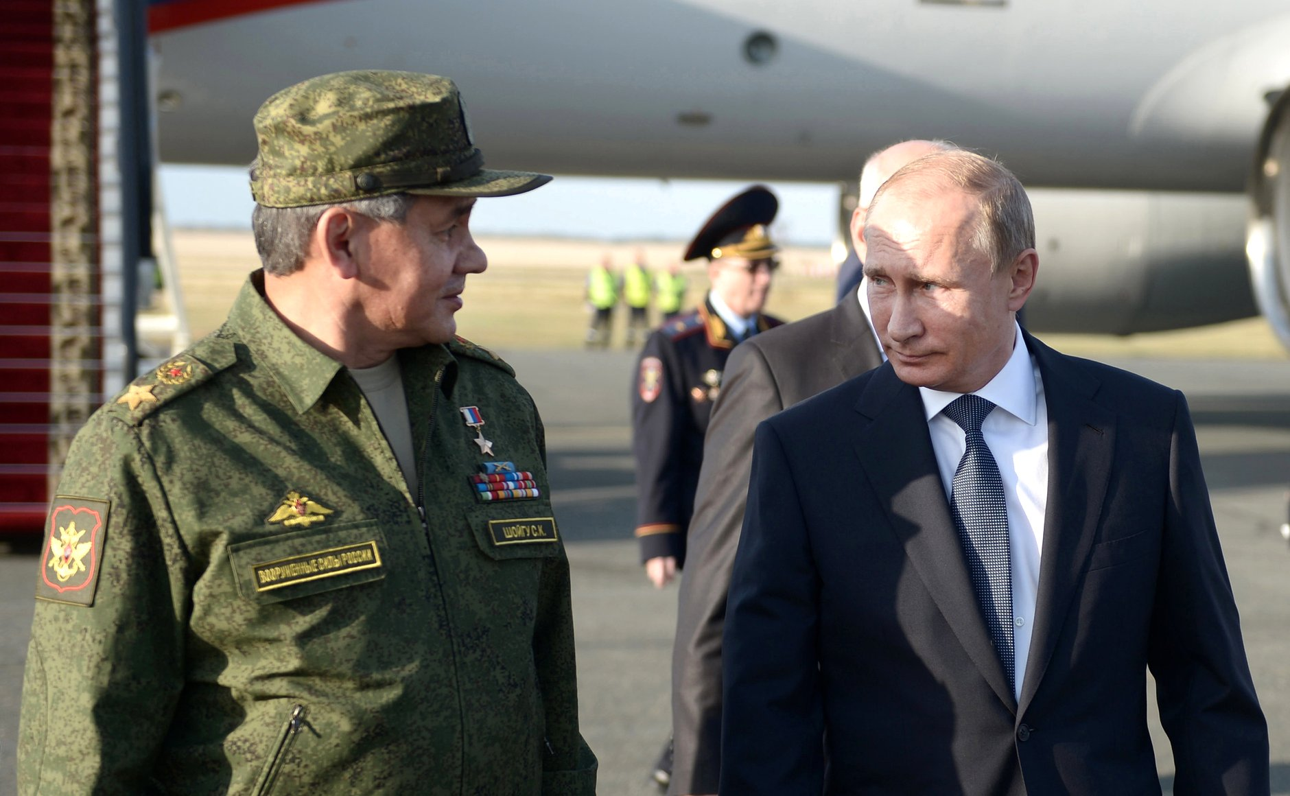 Верховный Главнокомандующий Вооружёнными Силами России Владимир Путин на завершающем этапе стратегических командно-штабных учений «Центр-2015» на полигоне «Донгузский» в Оренбургской области